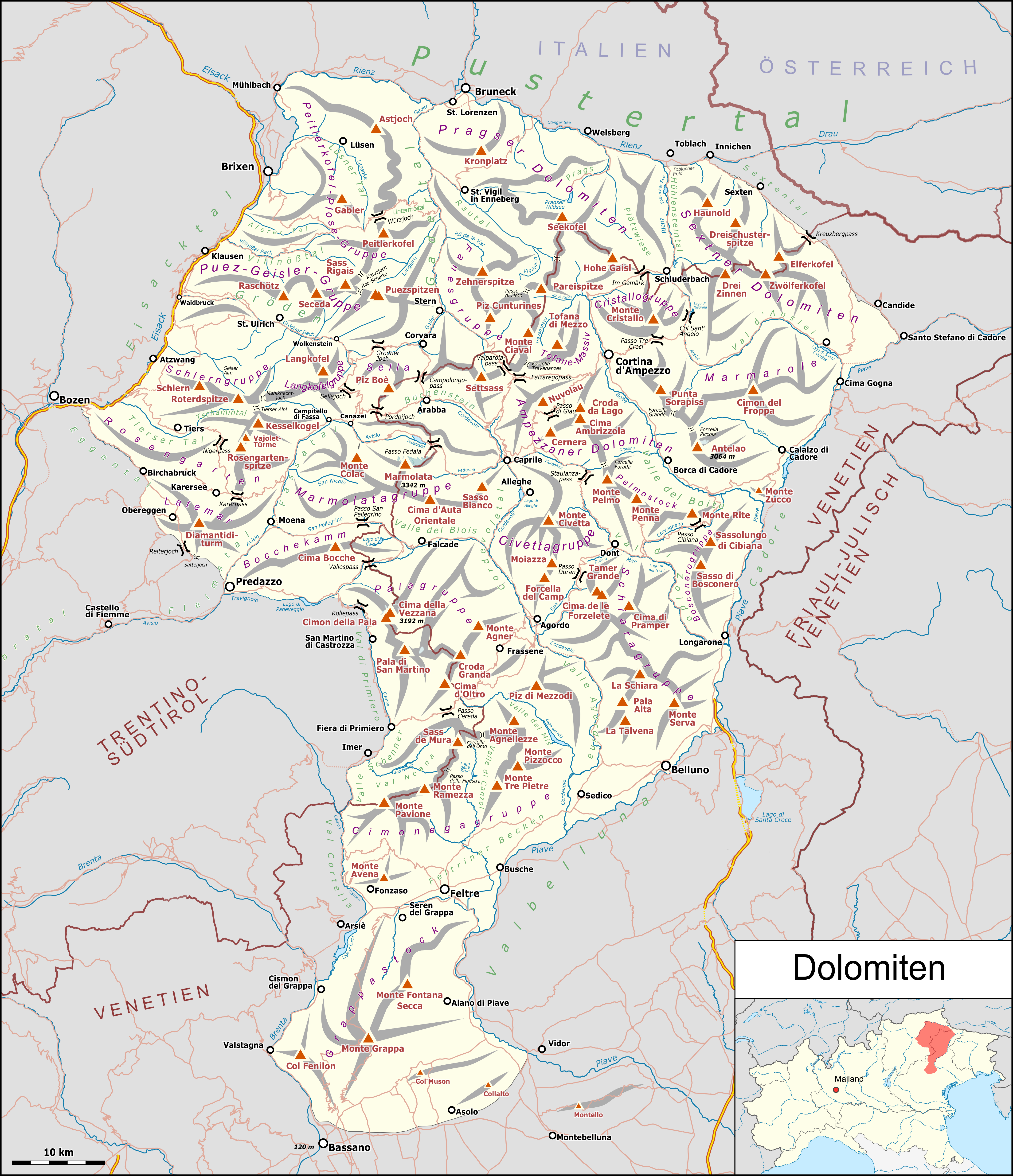 Karte der Dolomiten.